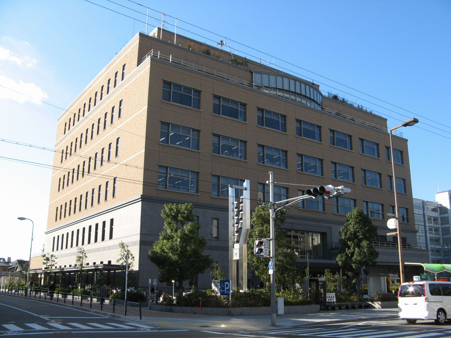 生野区役所